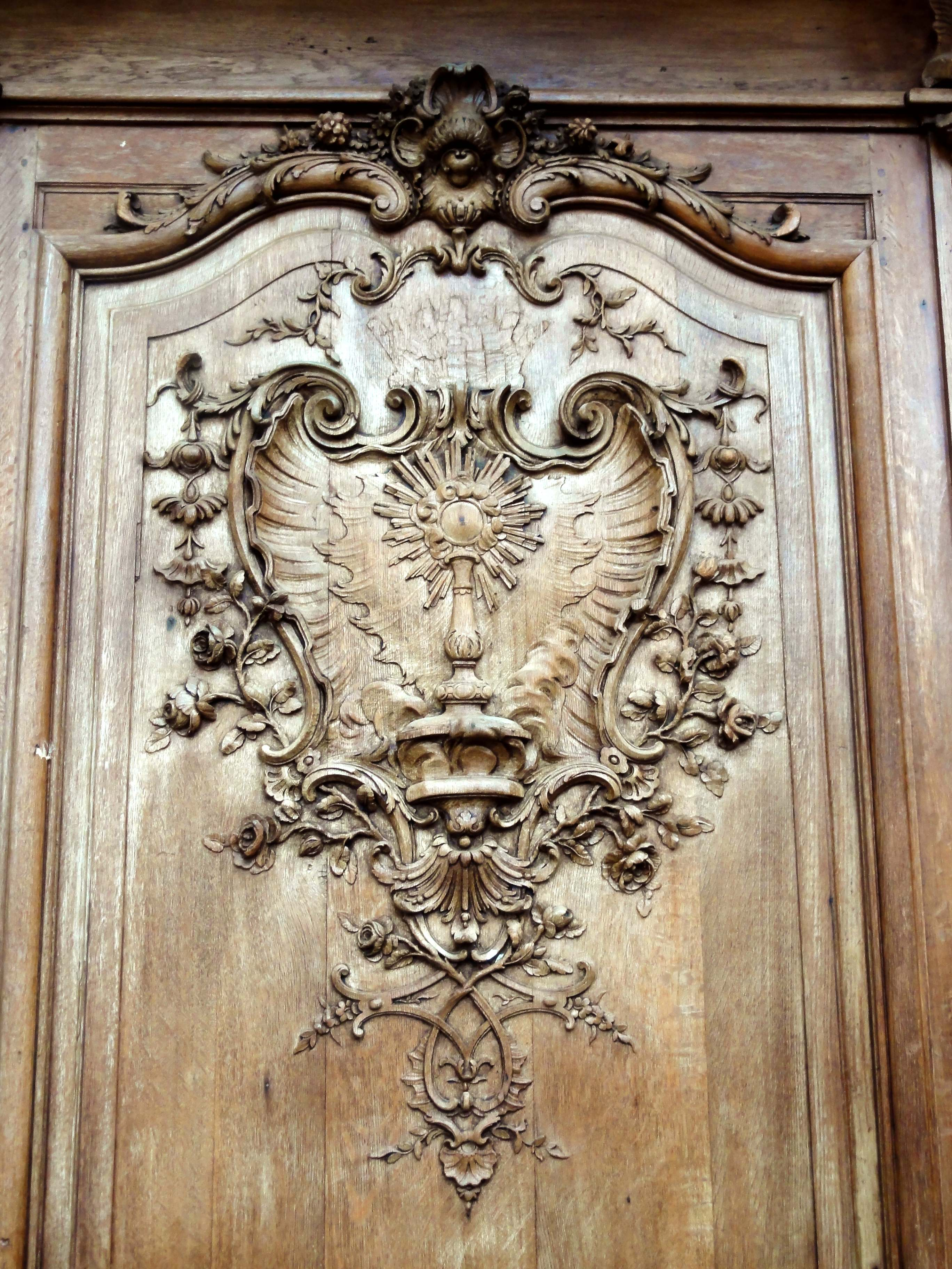 Boiseries provenant de l'abbaye de Chaalis (voir titre).